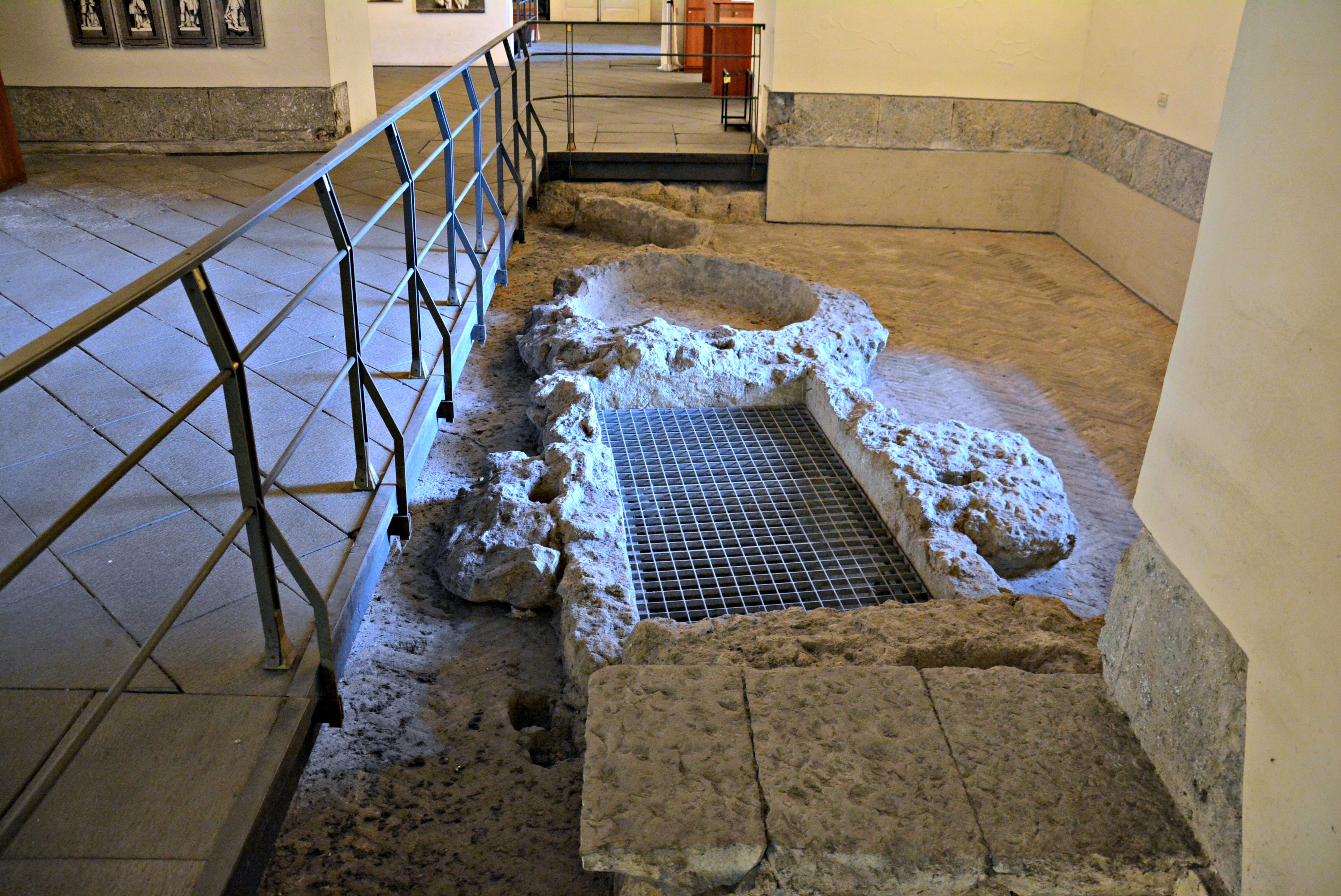 Vedi titolo